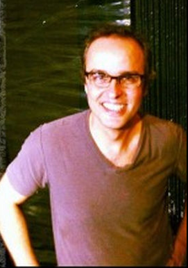 O diretor de cinema brasileiro Beto Brant, remix de foto anteriormente baixada